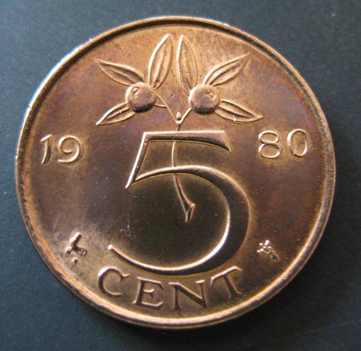 Nederlandse stuiver uit 1980, muntmeester Ir.B.C.H.J.Smit, muntmeesterteken Haan met ster, Juliana 5 cent, muntzijde.